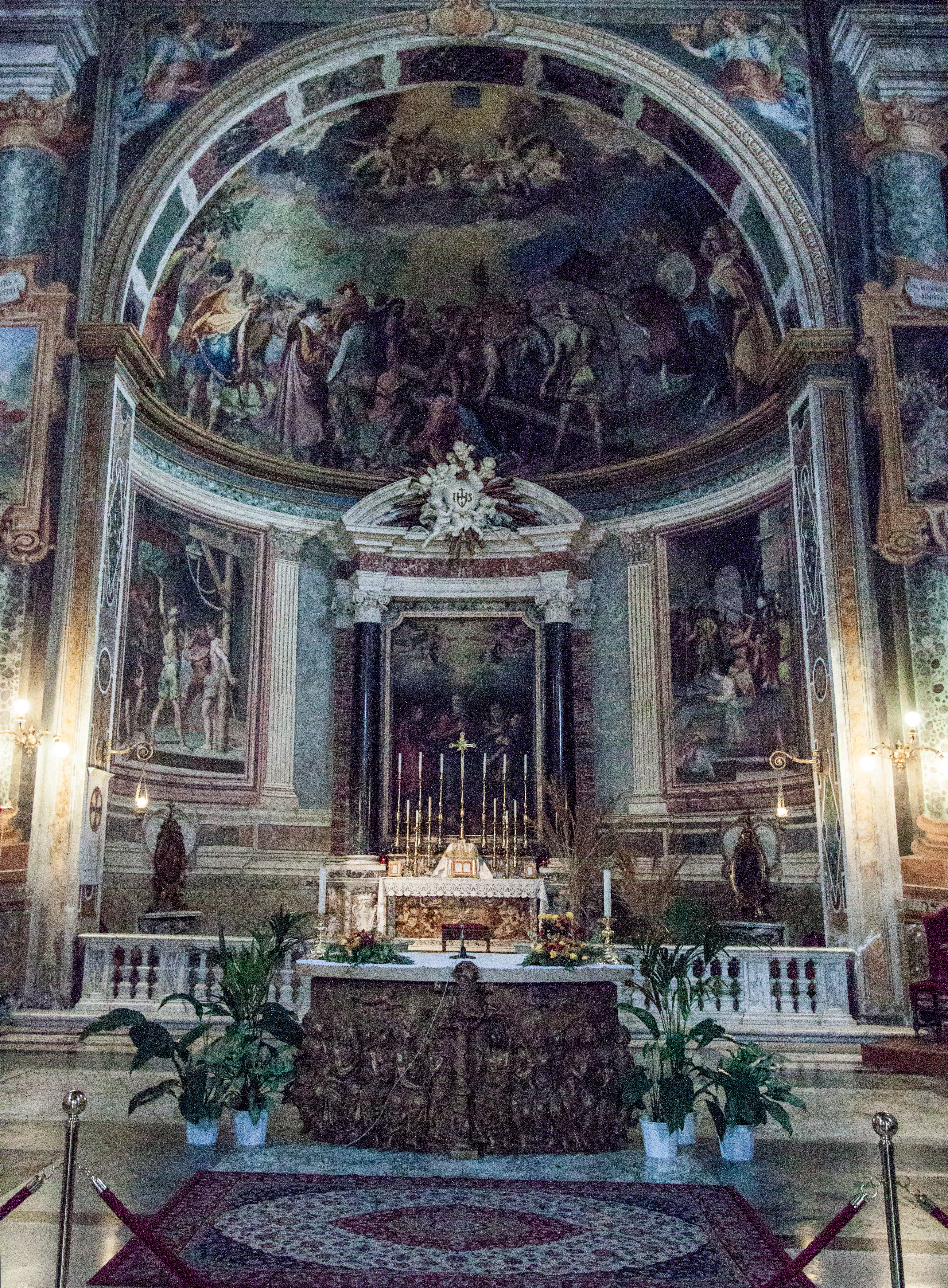 San Vitale Roma